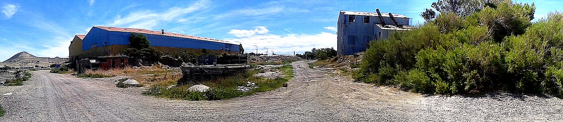 Restos del antiguo puerto de km5 con costrucciones porturias y del ferrocarril